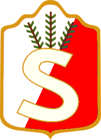 Etelä- ja Pohjois-Hämeen sekä Jyväskylän suojeluskuntapiirien käsivarsikilpi.